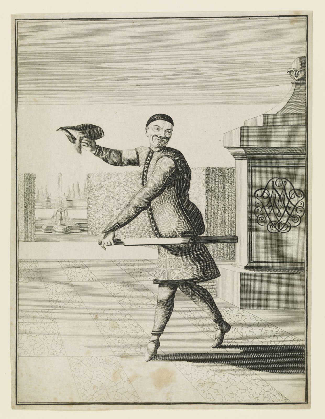 Der Schauspieler Johann Friedrich Müller als Harlekin; Radierung, 30 x 22,5 cm Germanisches Nationalmuseum Nürnberg, Inventarnummer: HB18750